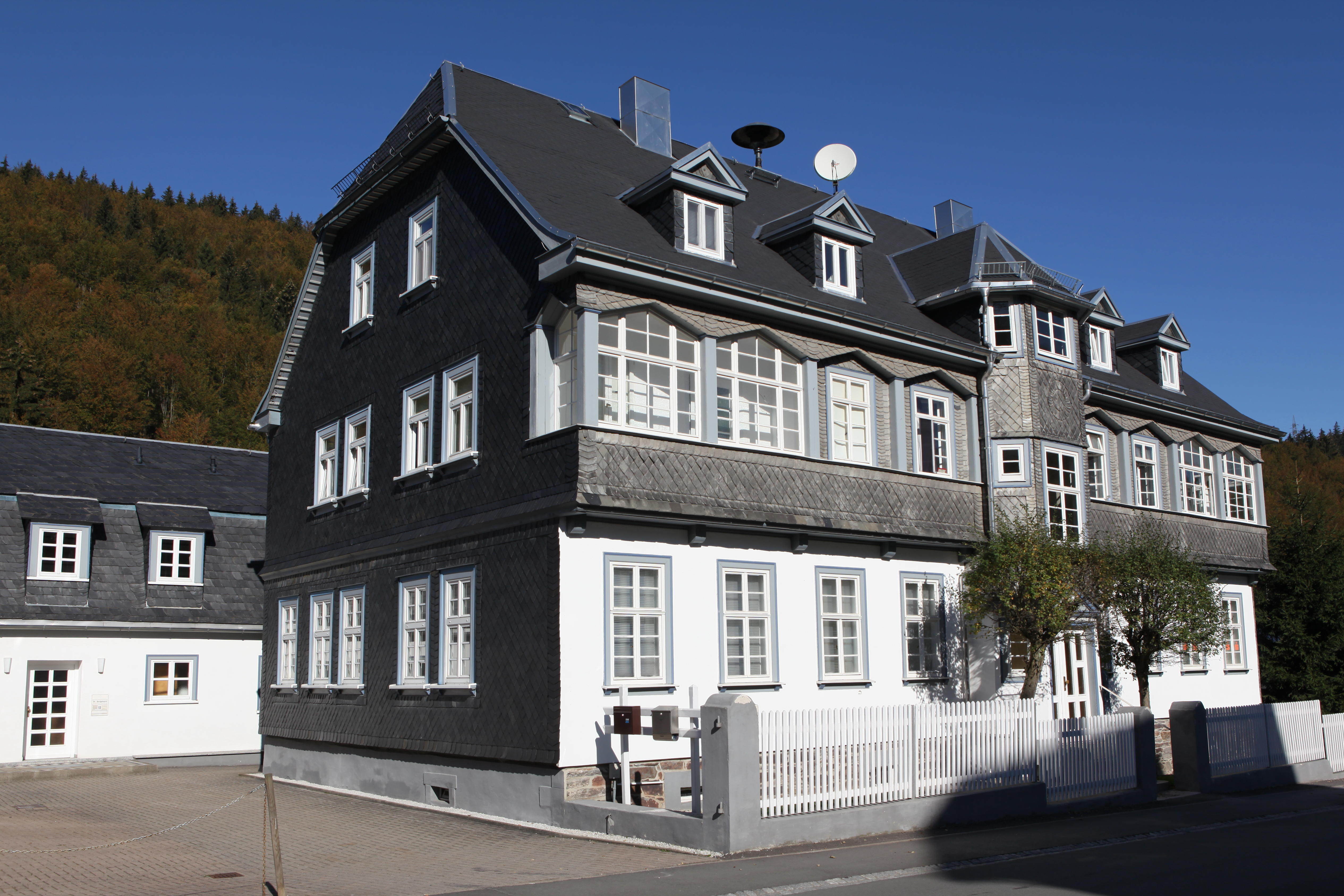 Hauptgebäude eines ehem. Sägewerkes, 1919, Goldisthal, Hauptstraße 22